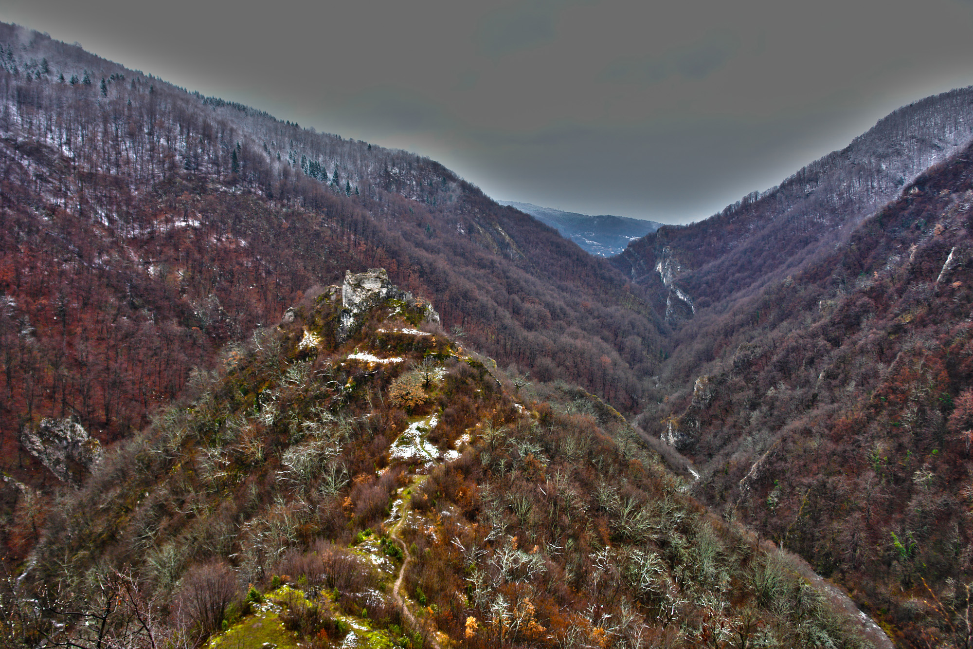 Bobovac Fortress